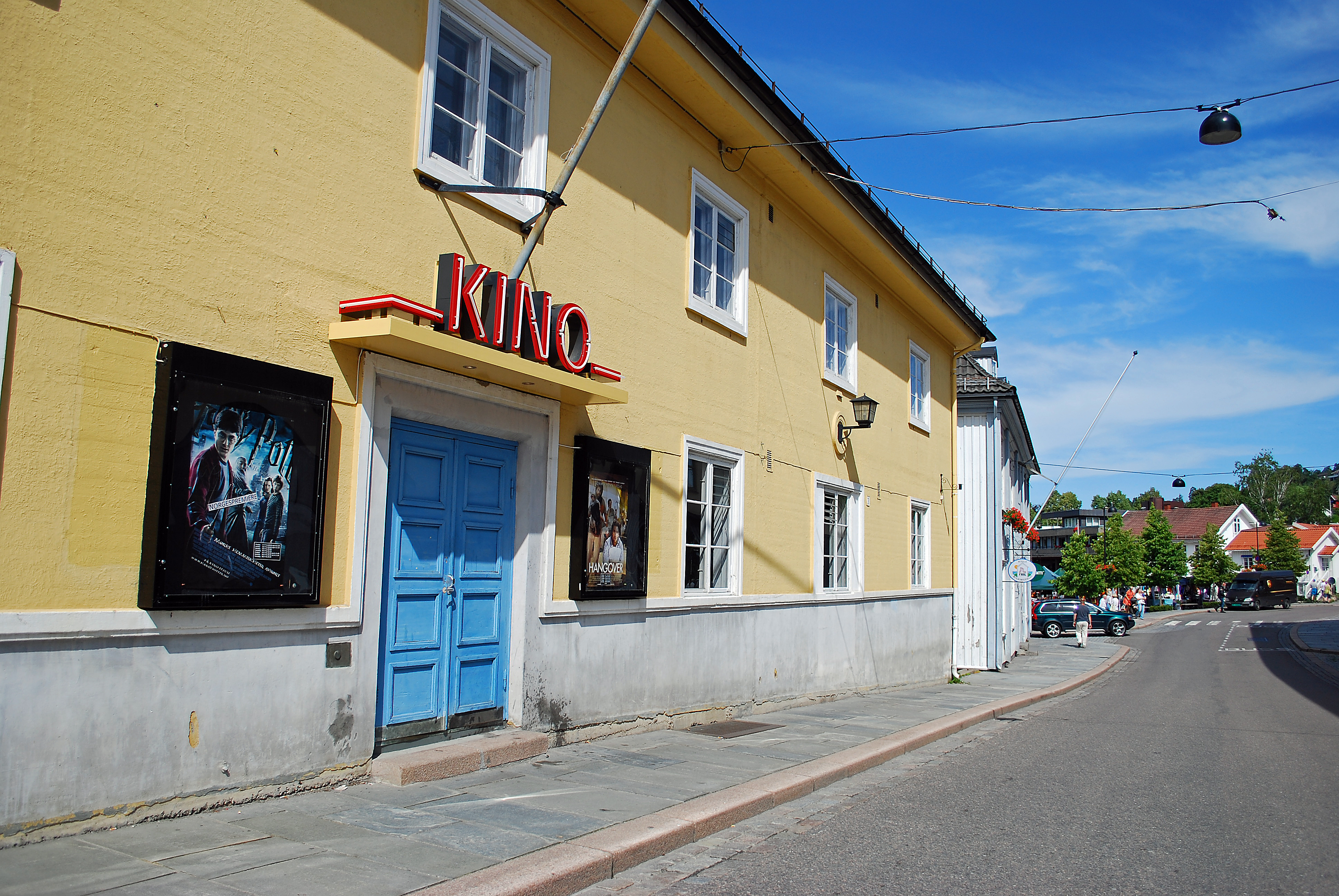 Drøbak kino